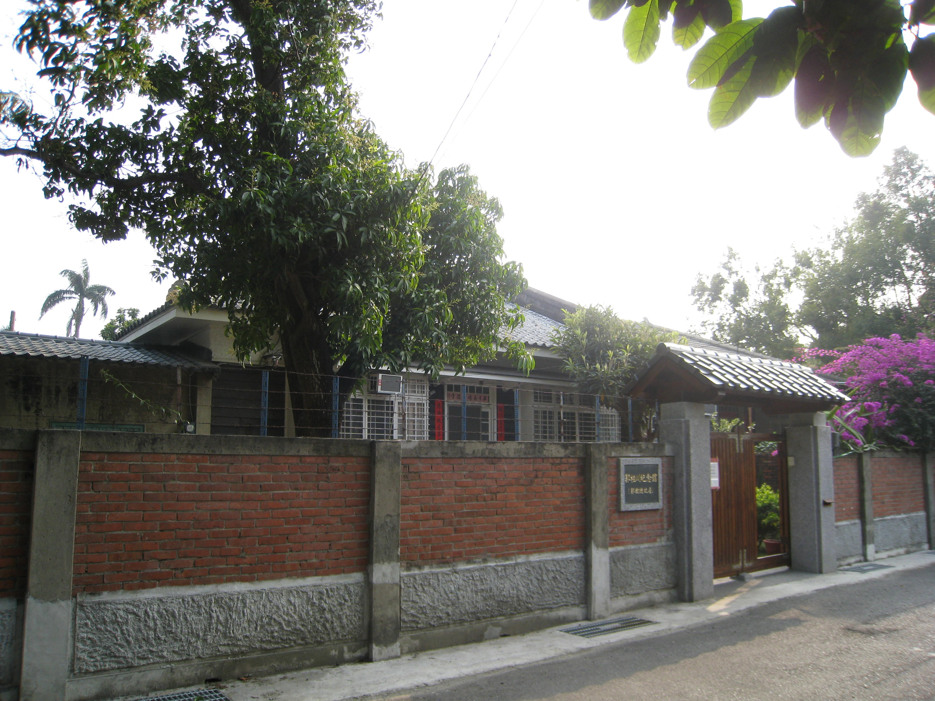 郭柏川台南故居1